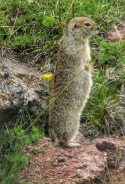 горный суслик (Spermophilus musicus)